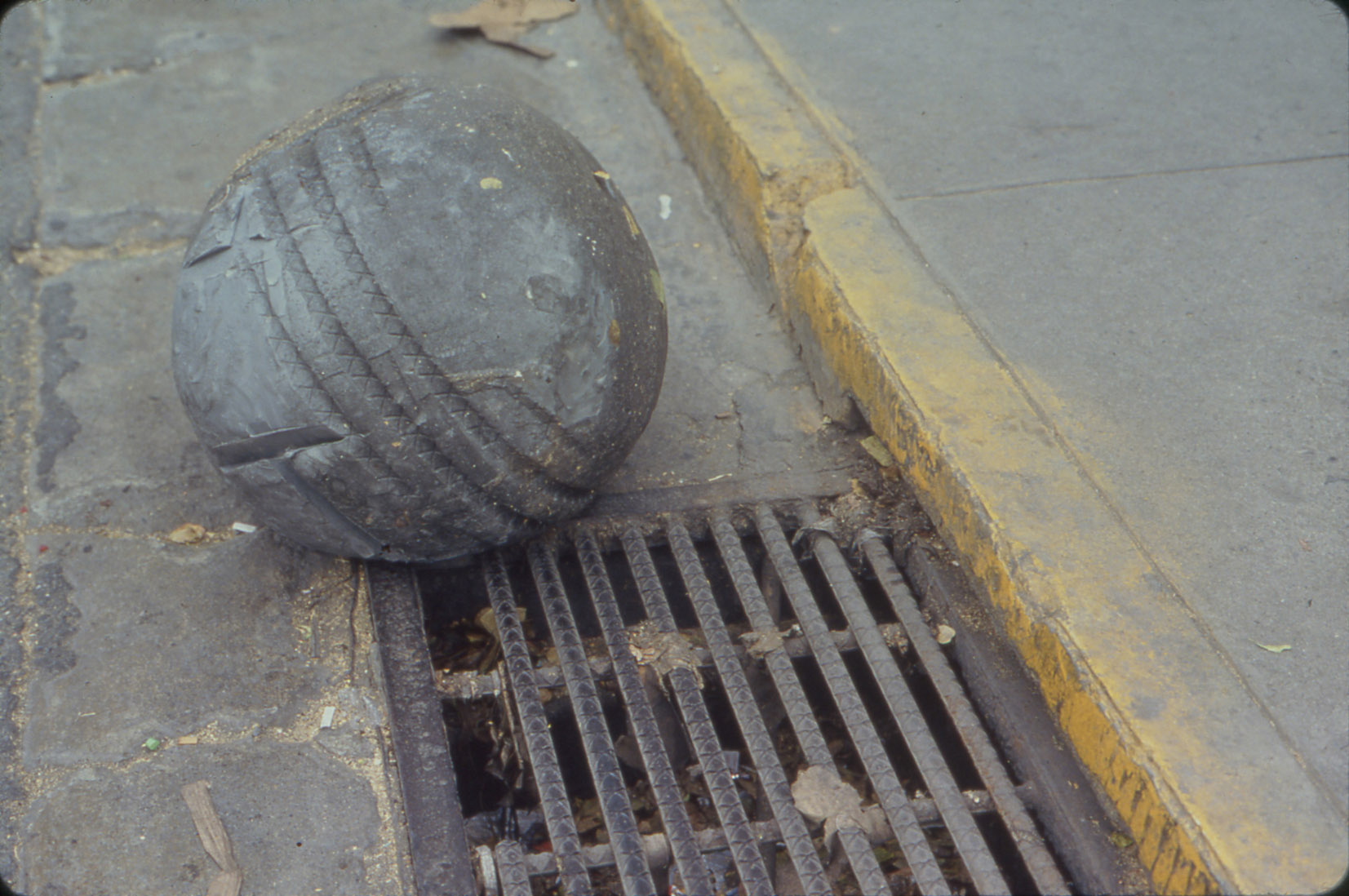 Gabriel Orozco, Yielding Stone, 1992